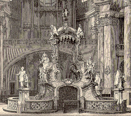 altar of Vierzehnheiligen in Franconia (Germany) Source: from the German 1891 encyclopedia Joseph Kürschner (editor): “Pierers Konversationslexikon”. Pierers Konversationslexikon. Siebente Auflage. Mit Universal-Sprachen-Lexikon nach Prof. Joseph Kürschners System. Union. (published by) Deutsche Verlagsgesellschaft in Stuttgart, 1891. herausgegeben von (edited by) Joseph Kürschner